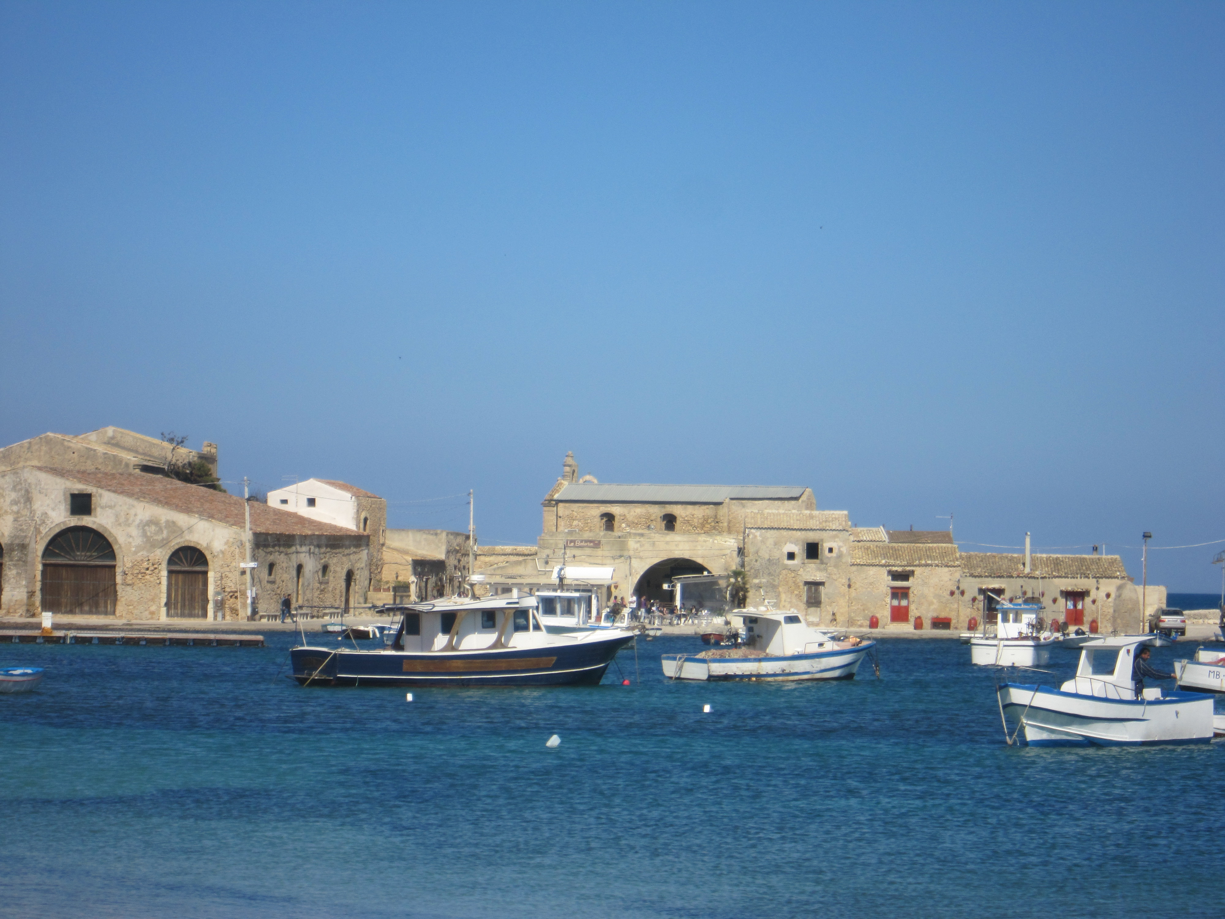 Piazza Regina Margherita, Marzamemi: Tonnara